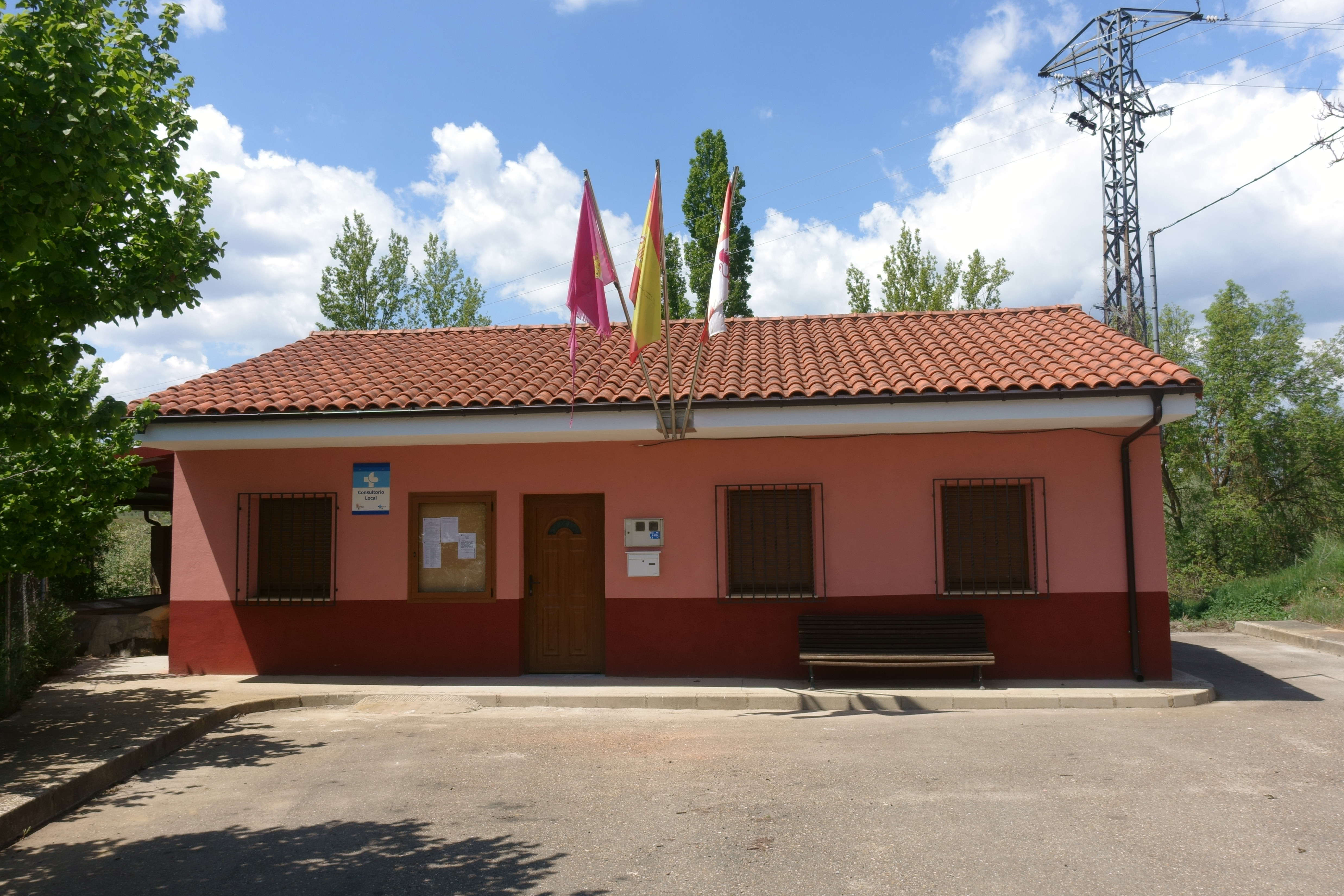 Casa consistorial de Villaselán (León, España).